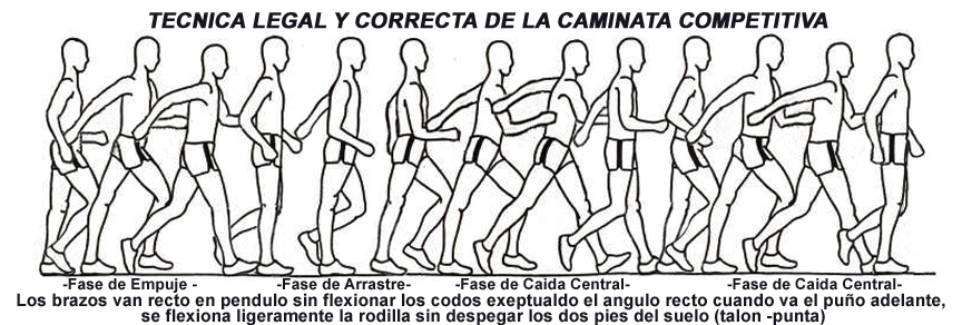 Tecnica de Caminata de Calle